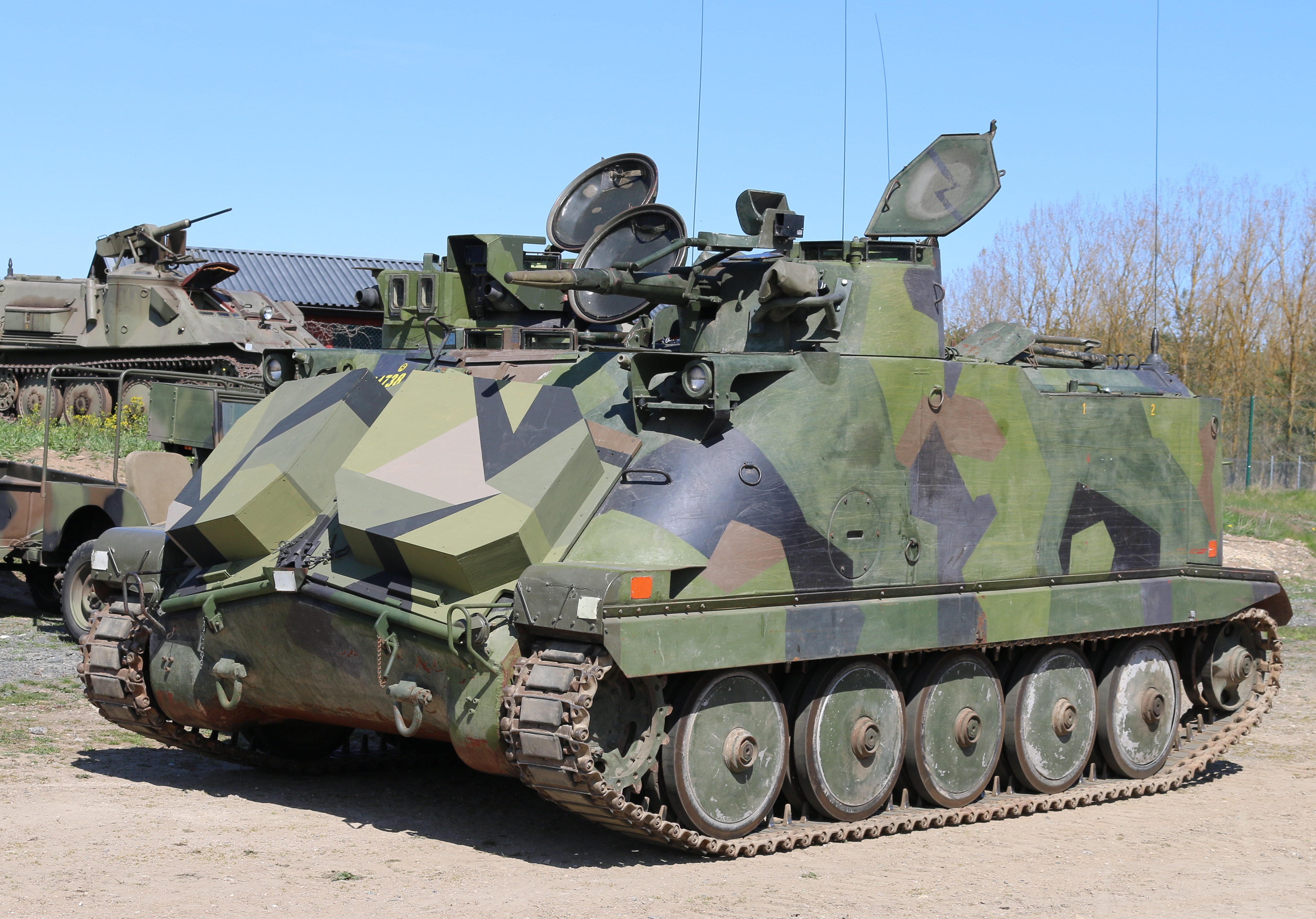 Pansarbandvagn 302 Artillerimuseet 2017